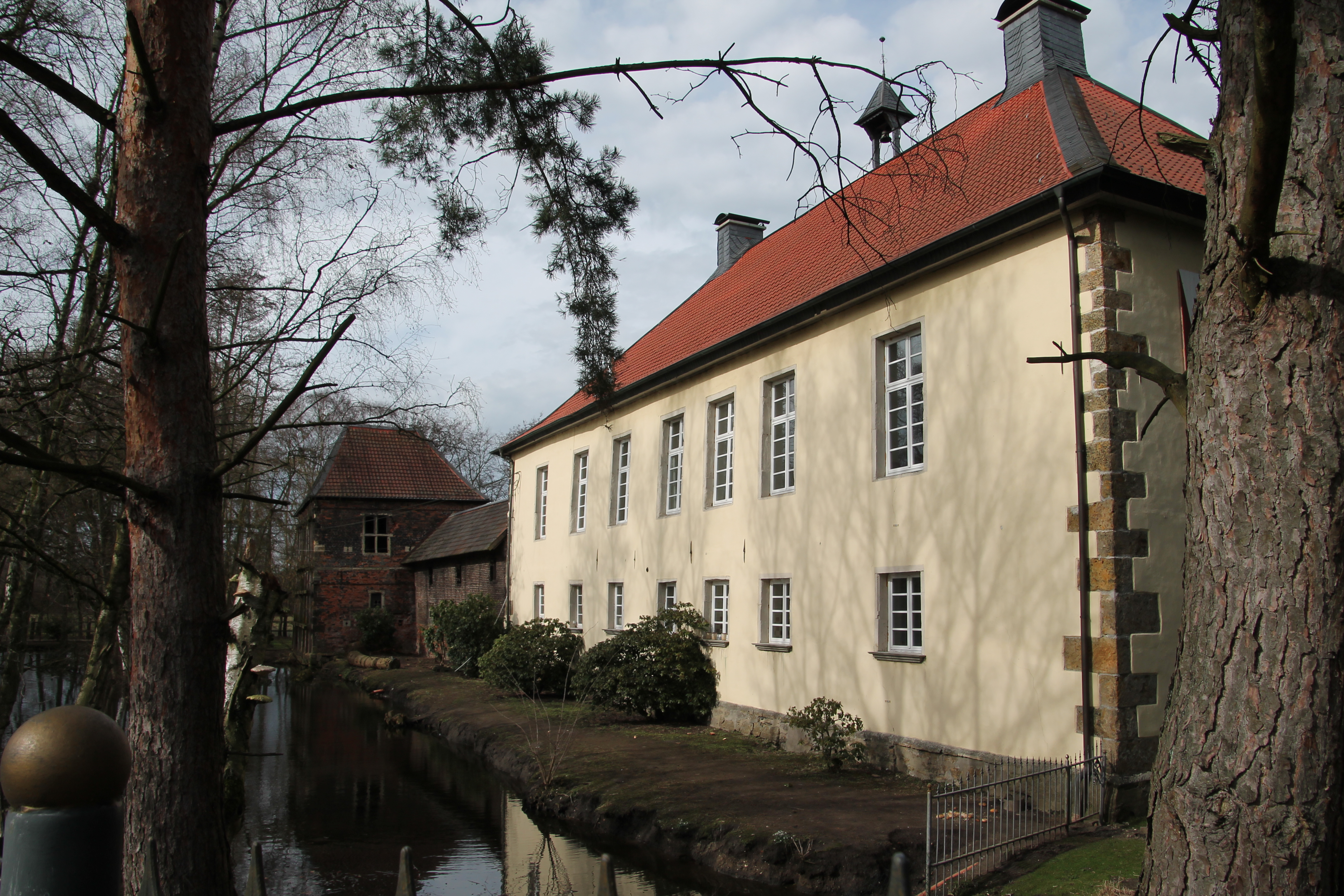 Ehemaliges Adelshaus und Rittergut Haus Brabeck in Kirchhellen